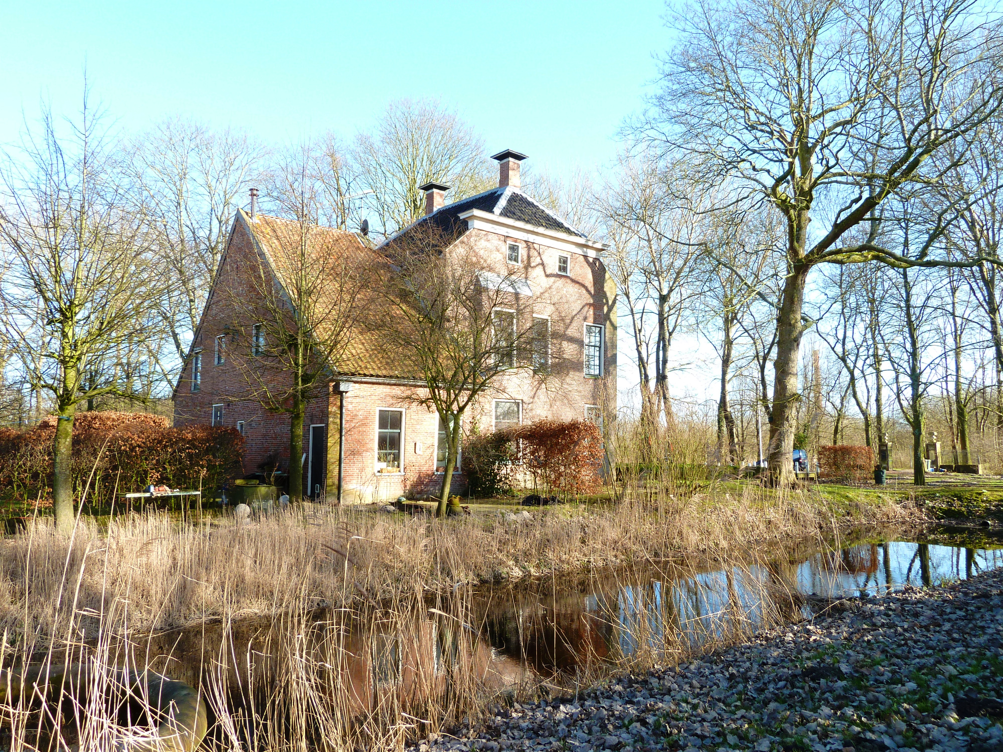 Borg Rusthoven, gezien schuin van achteren.